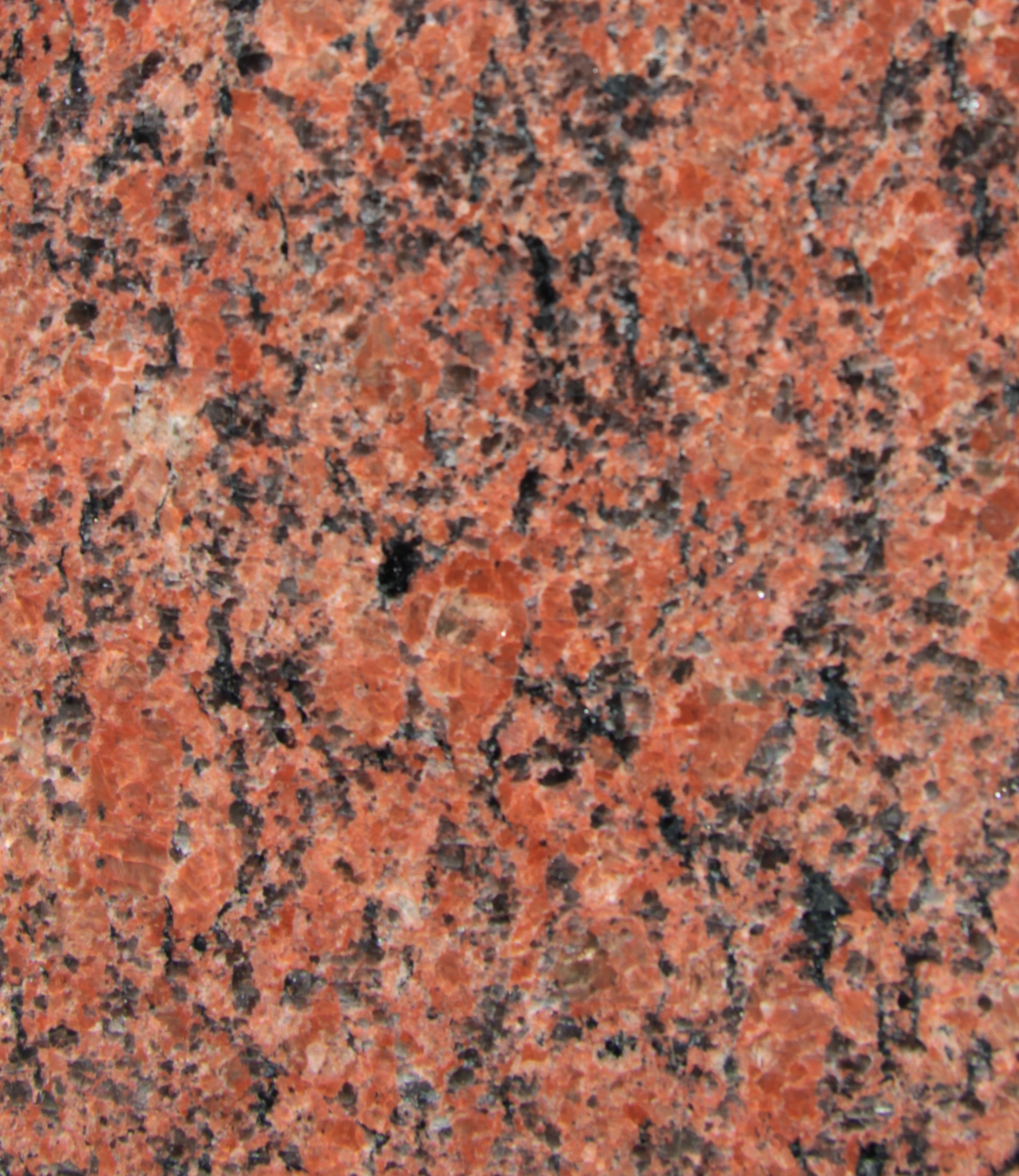 Muster des Bohus-Gneis (ca. 10x10cm)